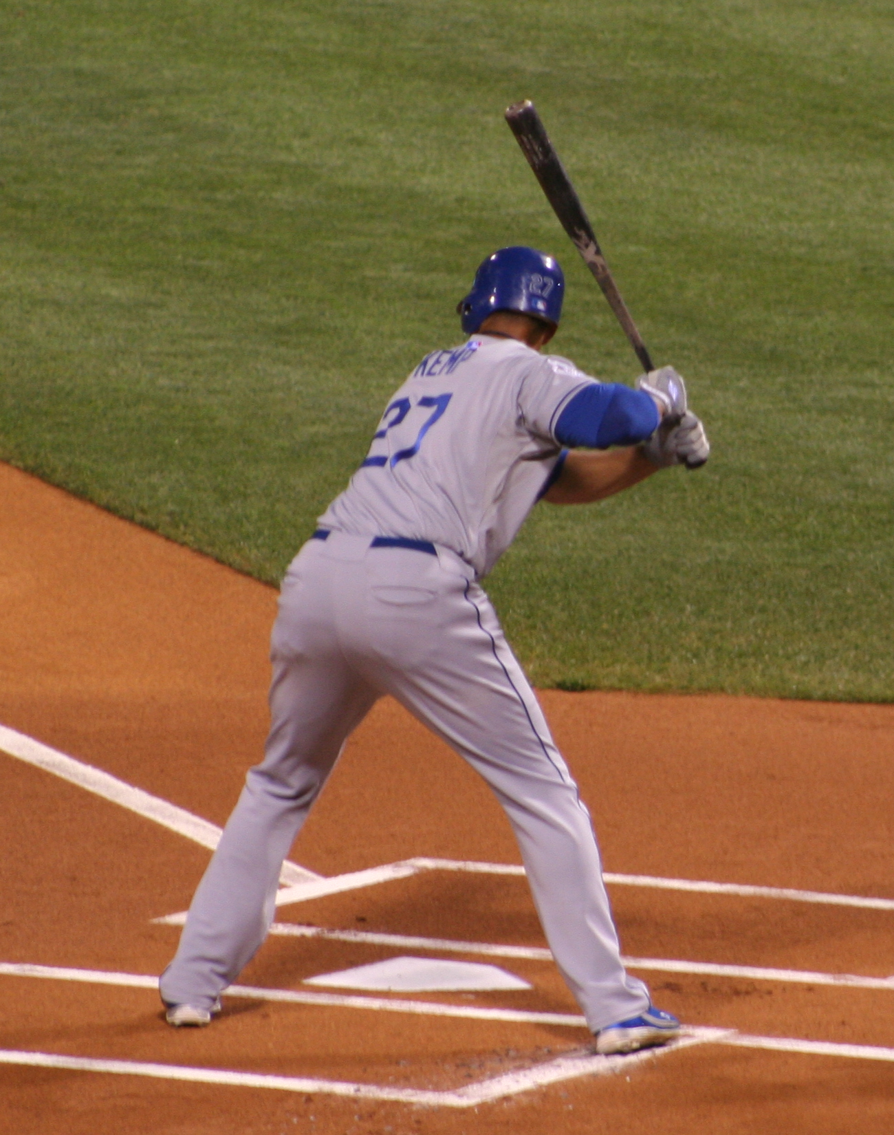 Matt Kemp